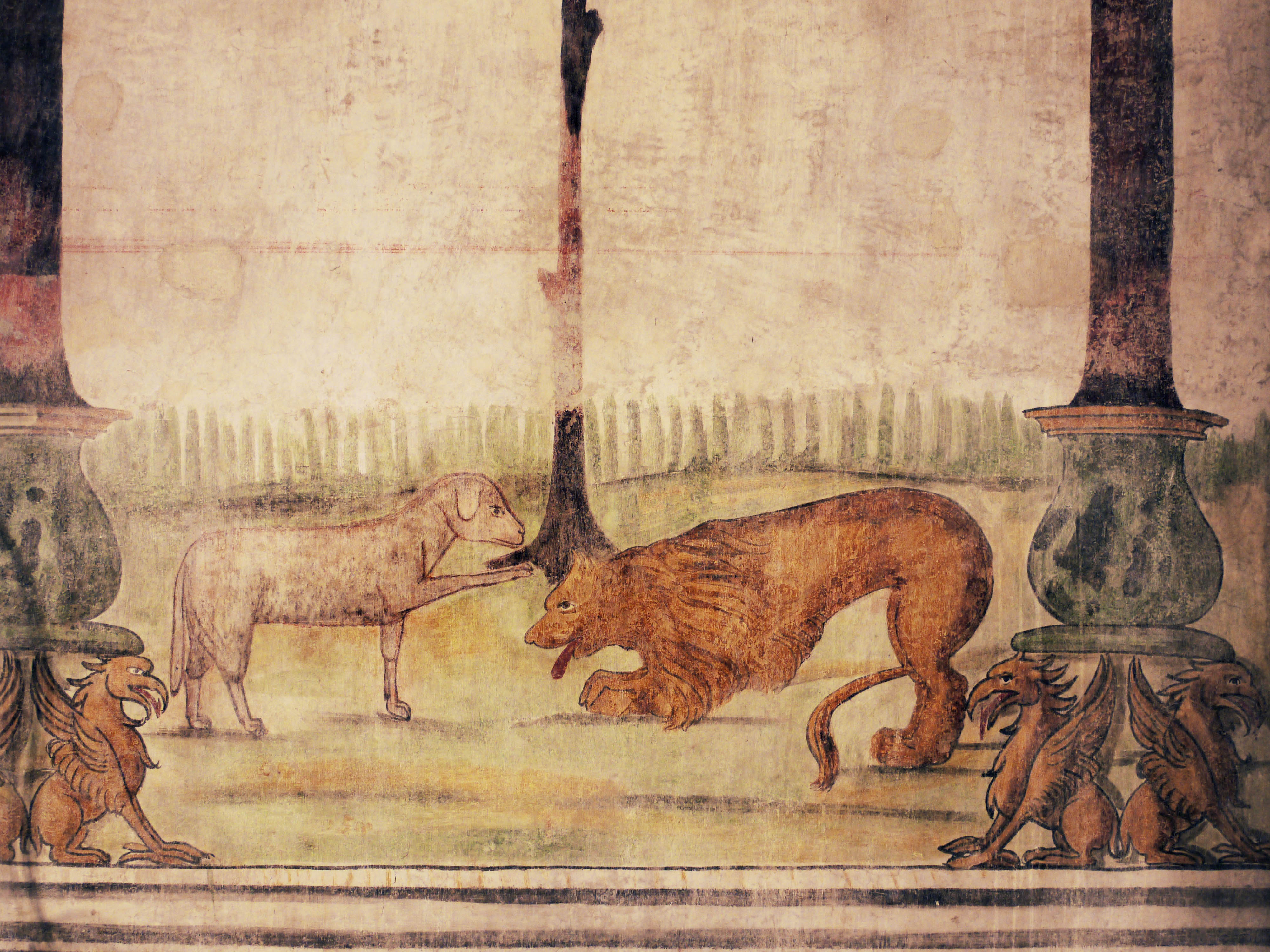 Ca' Cappello (XV sec), Affresco "Umilitas vincit o[m]nia" - Meolo (VE)